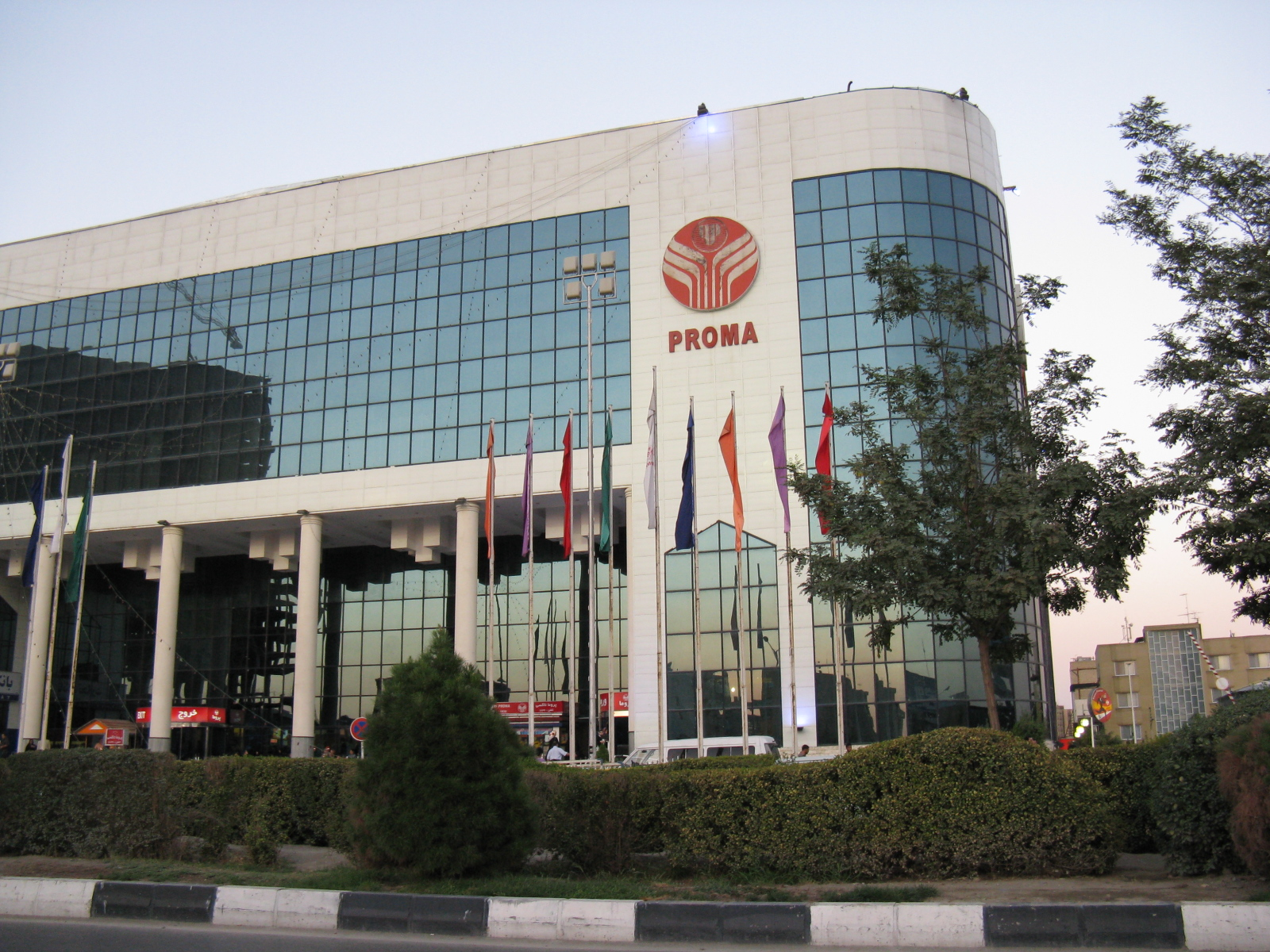 از مقاله مشهد ویکی انگلیسی گرفتم